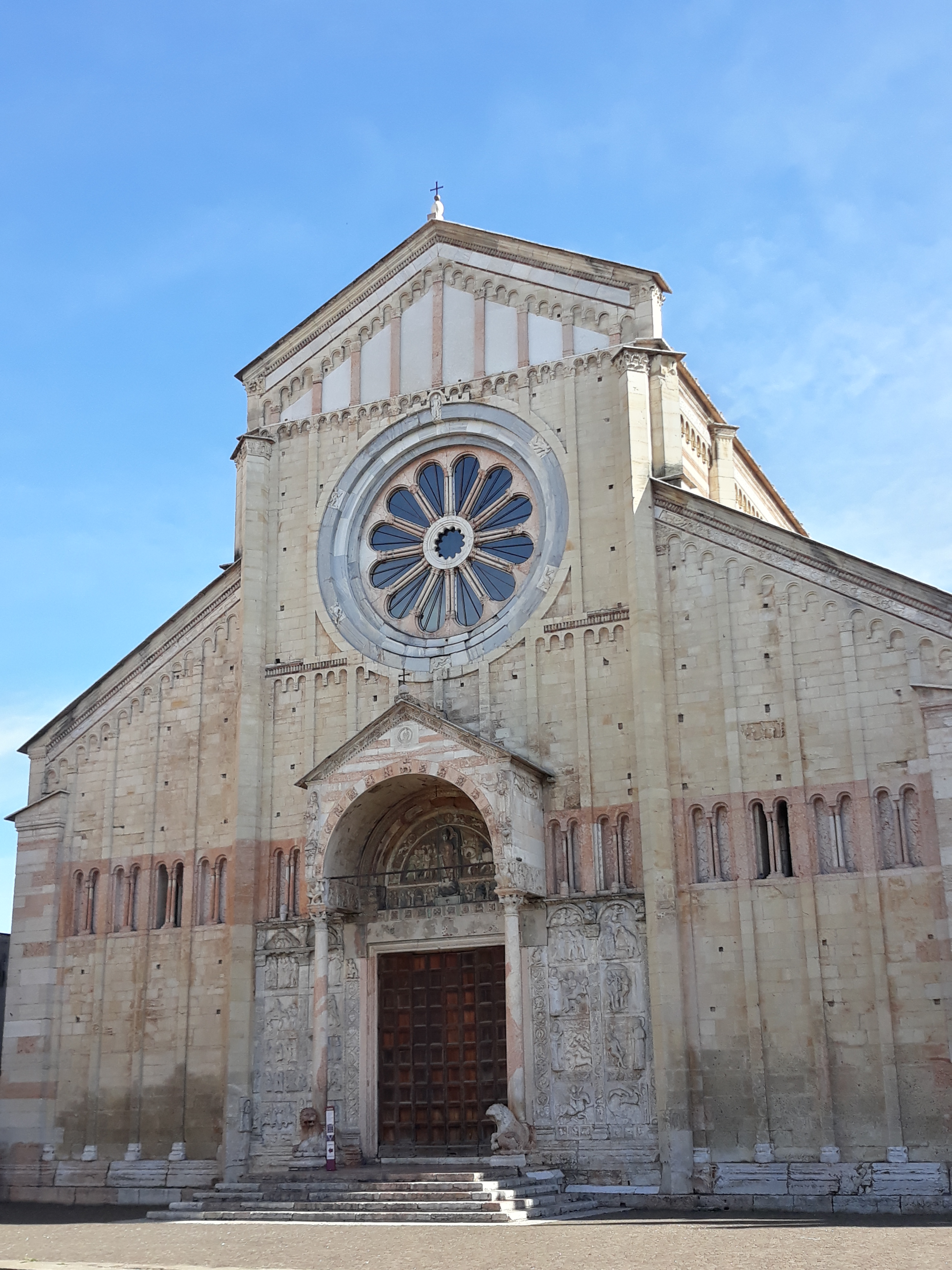 Basilica di San Zeno a Verona